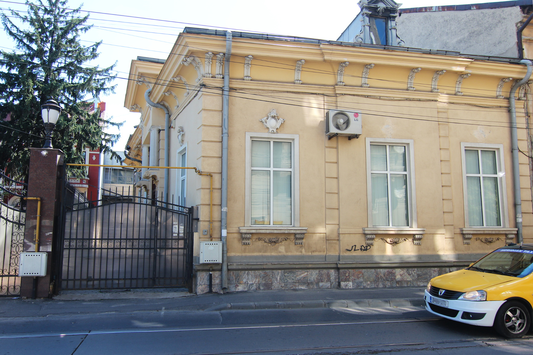 Casă pe Calea Călărașilor